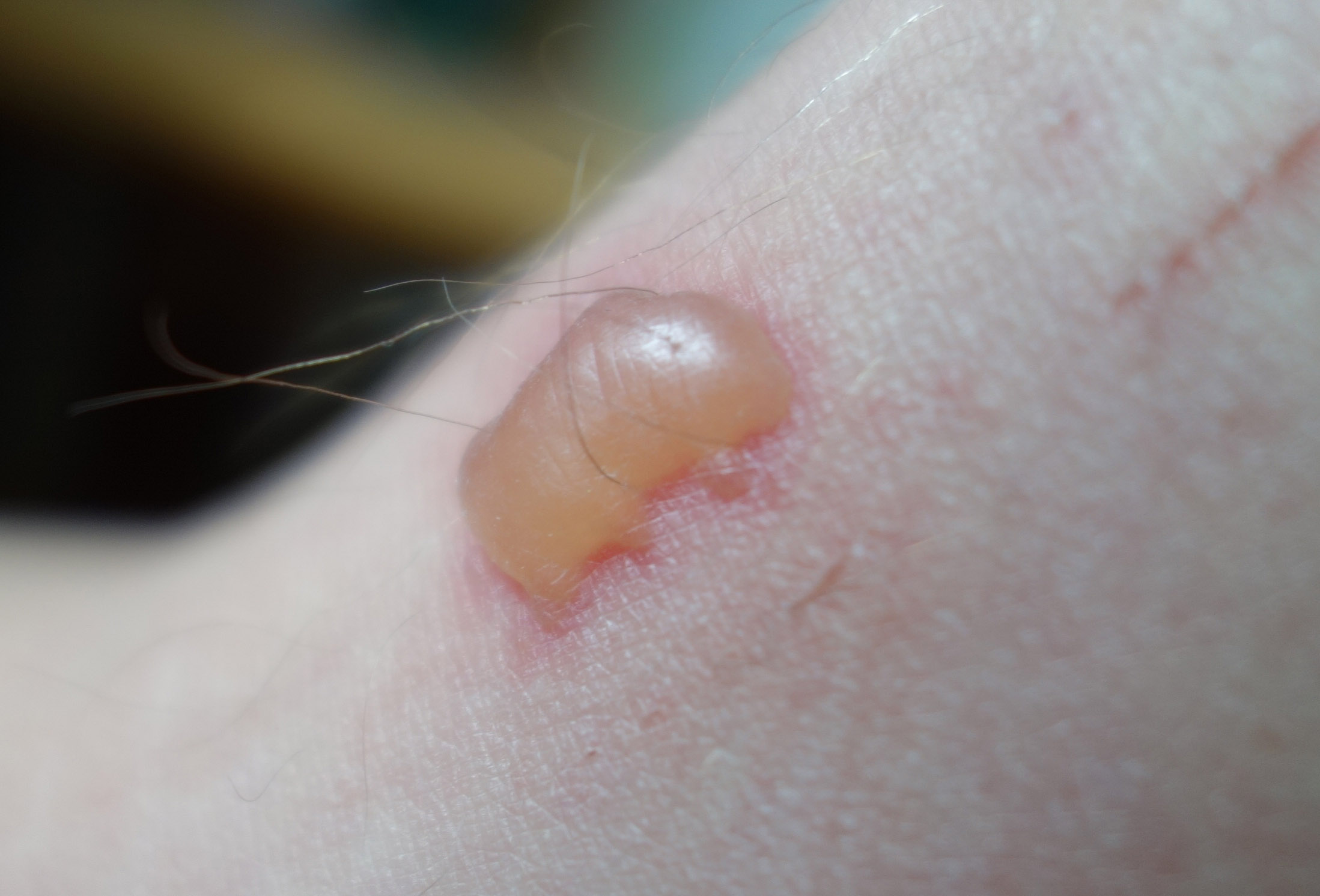 Phototoxische Reaktion nach Berühren von Diptam (Ausprägung nach 4 Tagen).